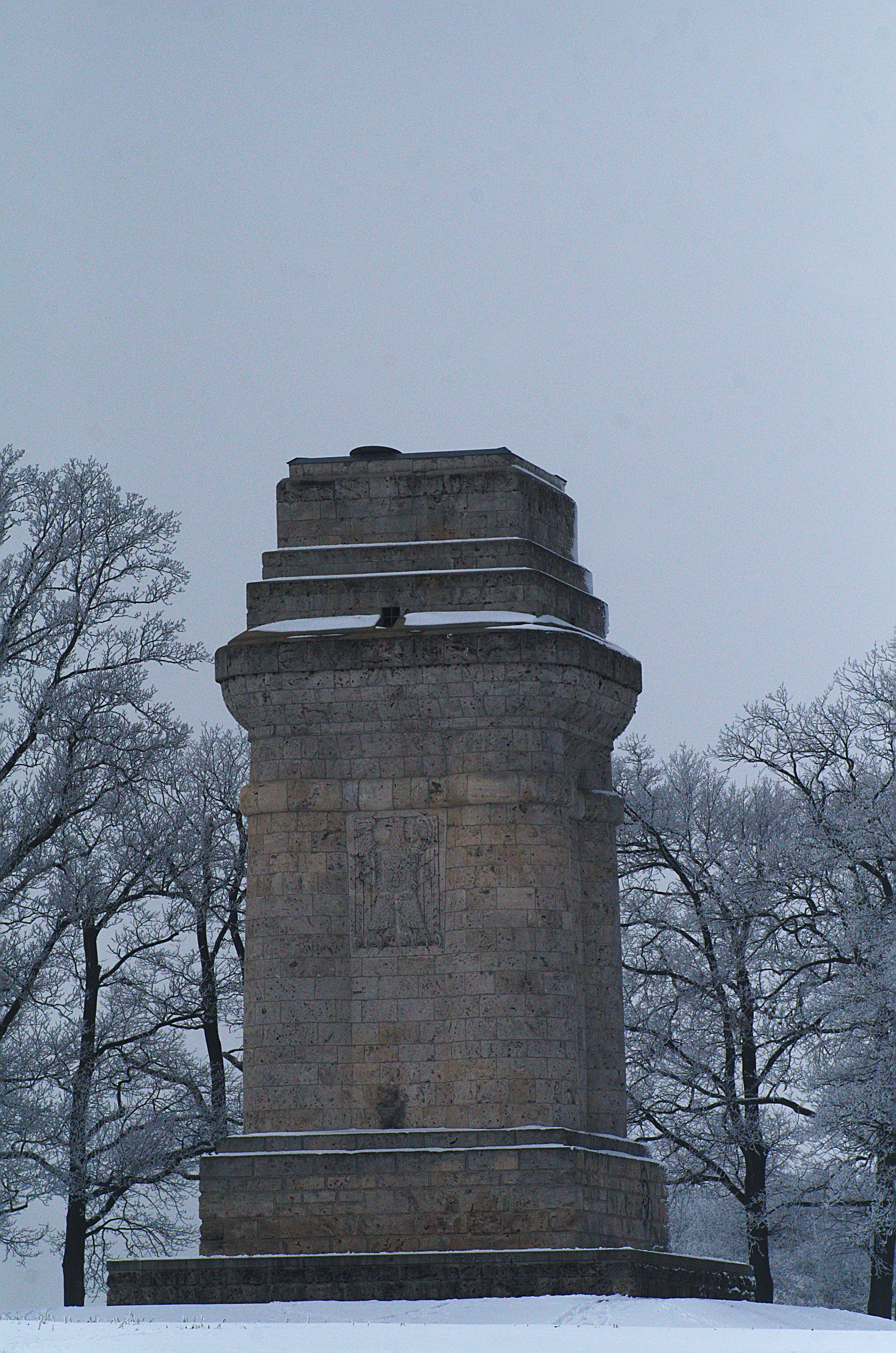 Winteraufnahme vom Bismarckturm Augsburg.